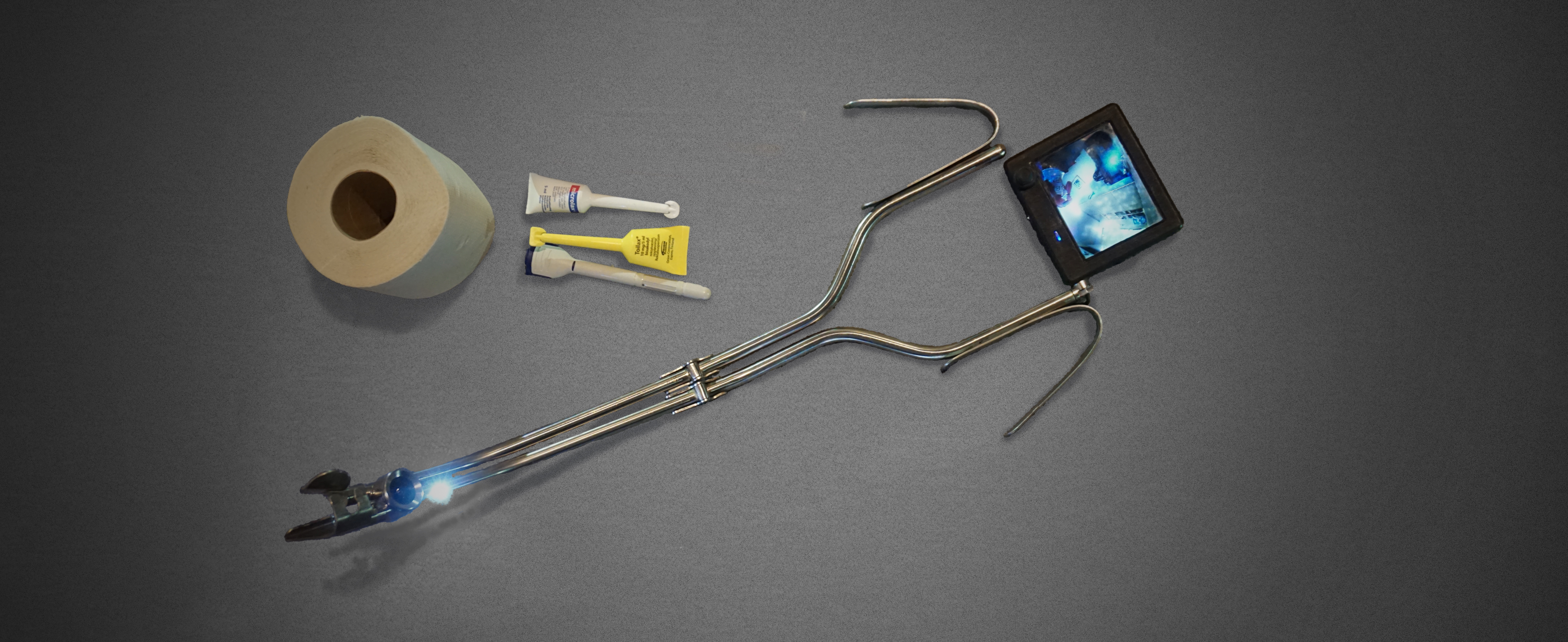 Dignum toaletthjelpemiddel